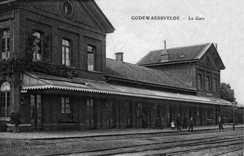 Bâtiment voyageurs et intérieur de la gare frontière de Godewaersvelde vers 1900.